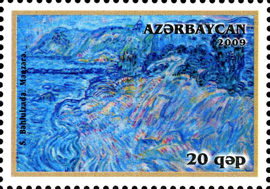 Azerbaijan Art School - Sattar Bakhlulzadeh - Landscape